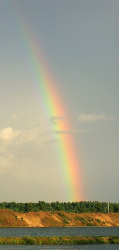 Vikerkaar